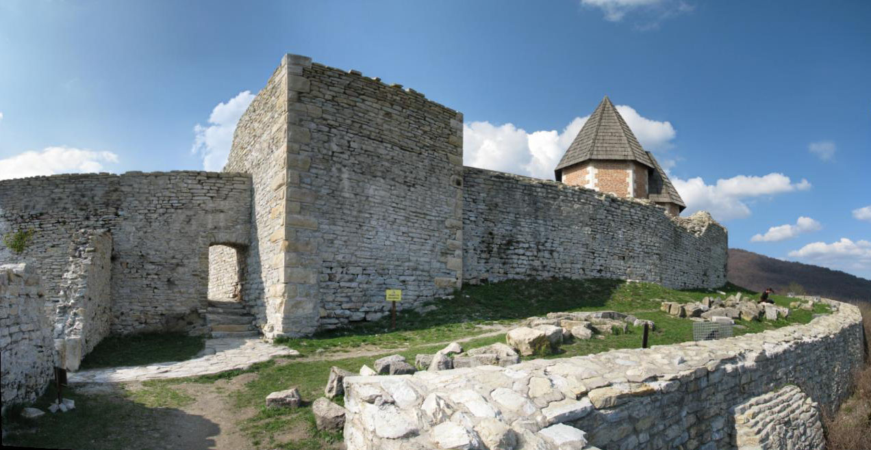 Medvedgrad, Zagreb